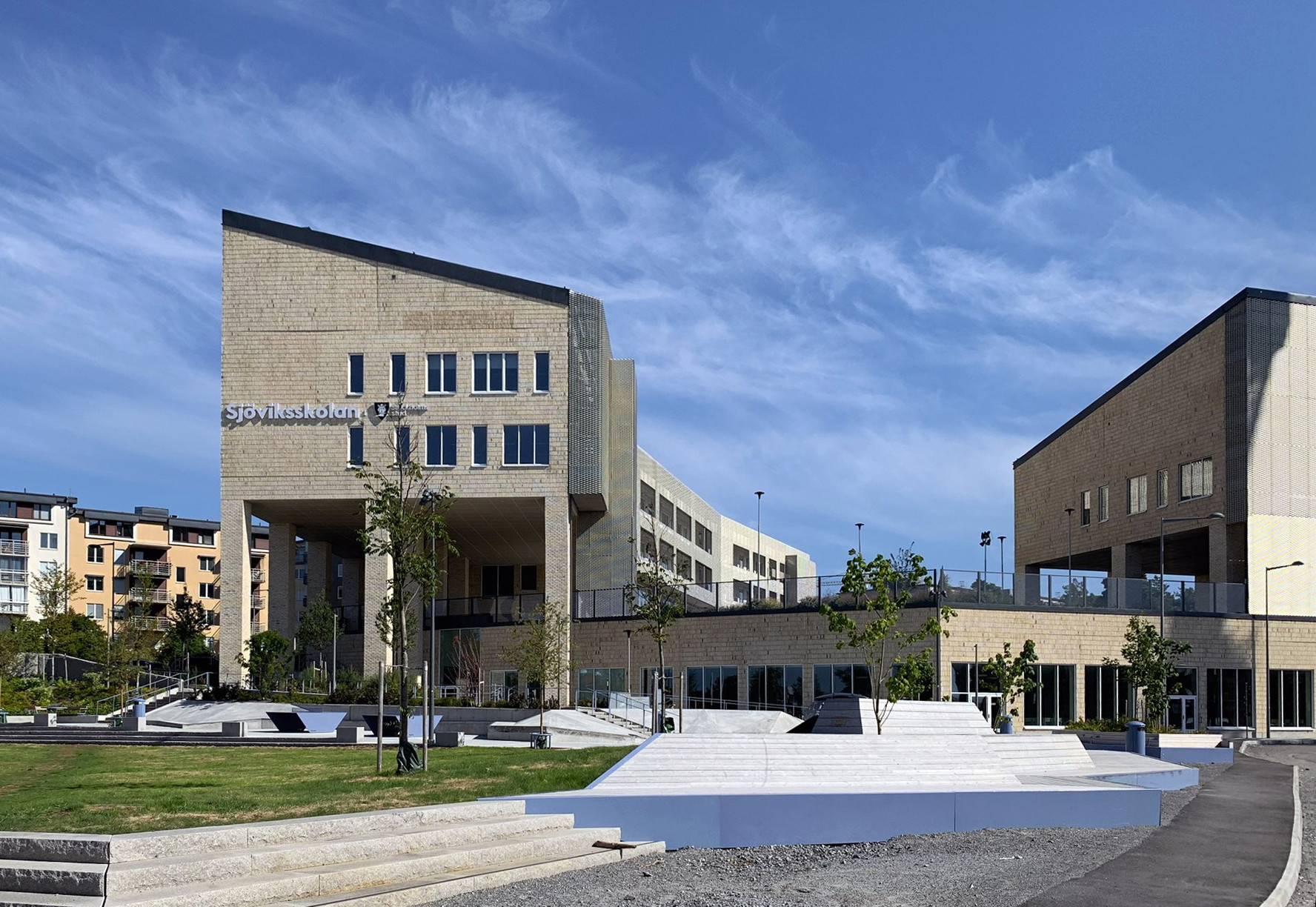 Sjöviksskolan precis efter den blev färdigbyggt. Bild tagen mot öst.